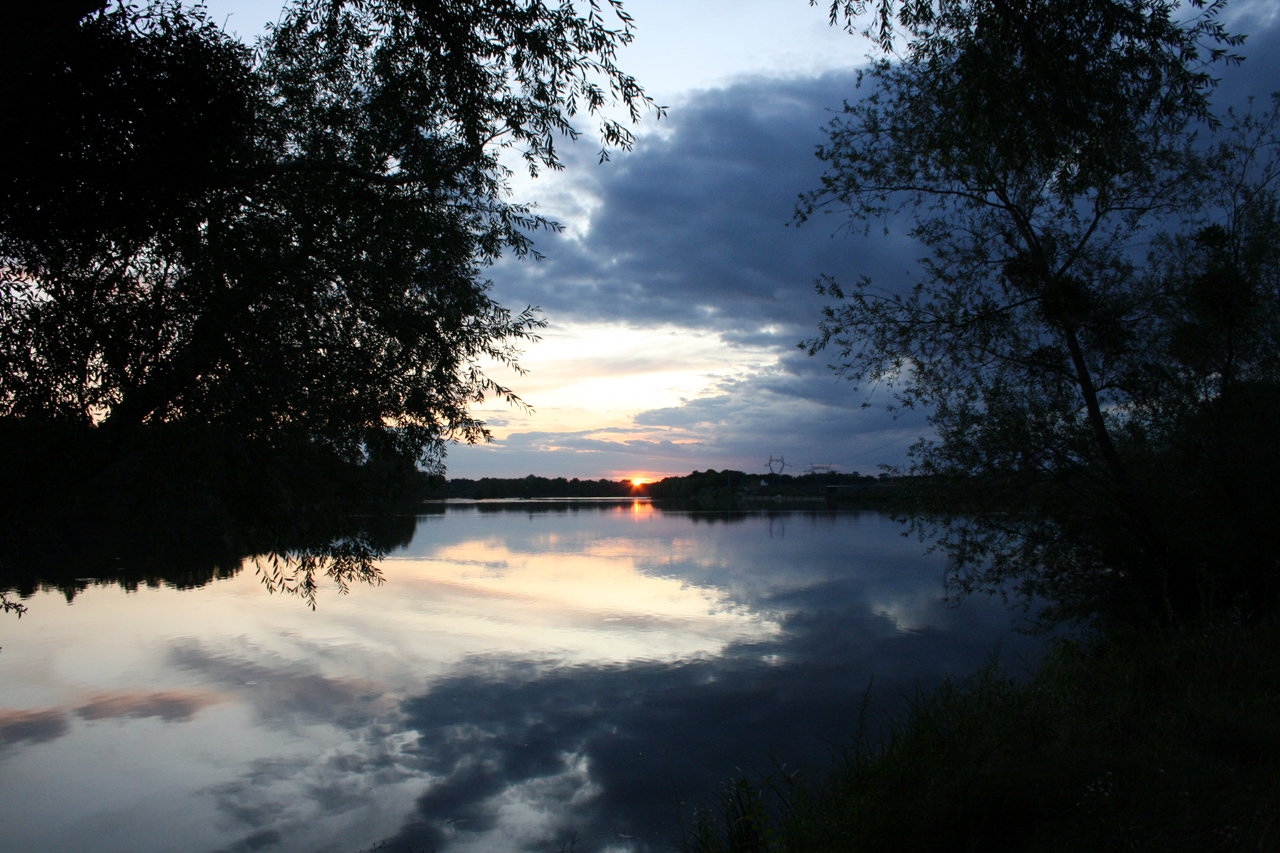 Couché de soleil sur la Loire à Nevoy ( Loiret )